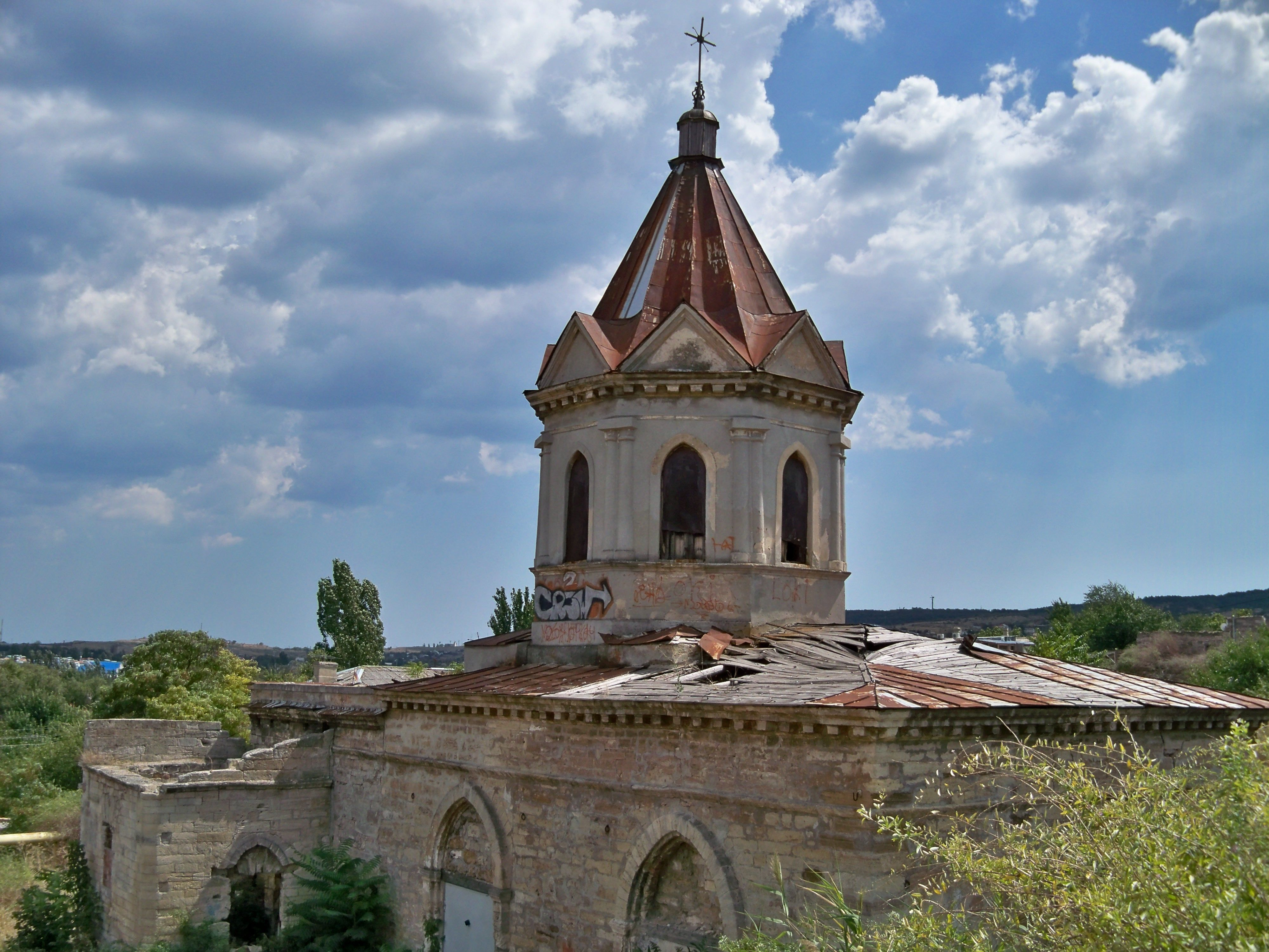 Церква Георгія (вірмено-григоріанська церква Св. Георгія), Феодосія, вул. Нахімова, 32